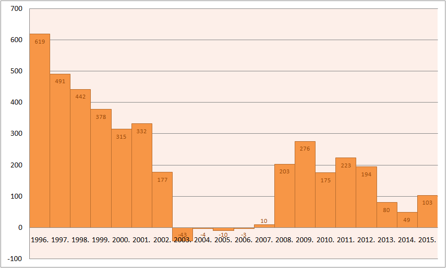 Српски (ћирилица): Природни прираштај у Граду Бањој Луци